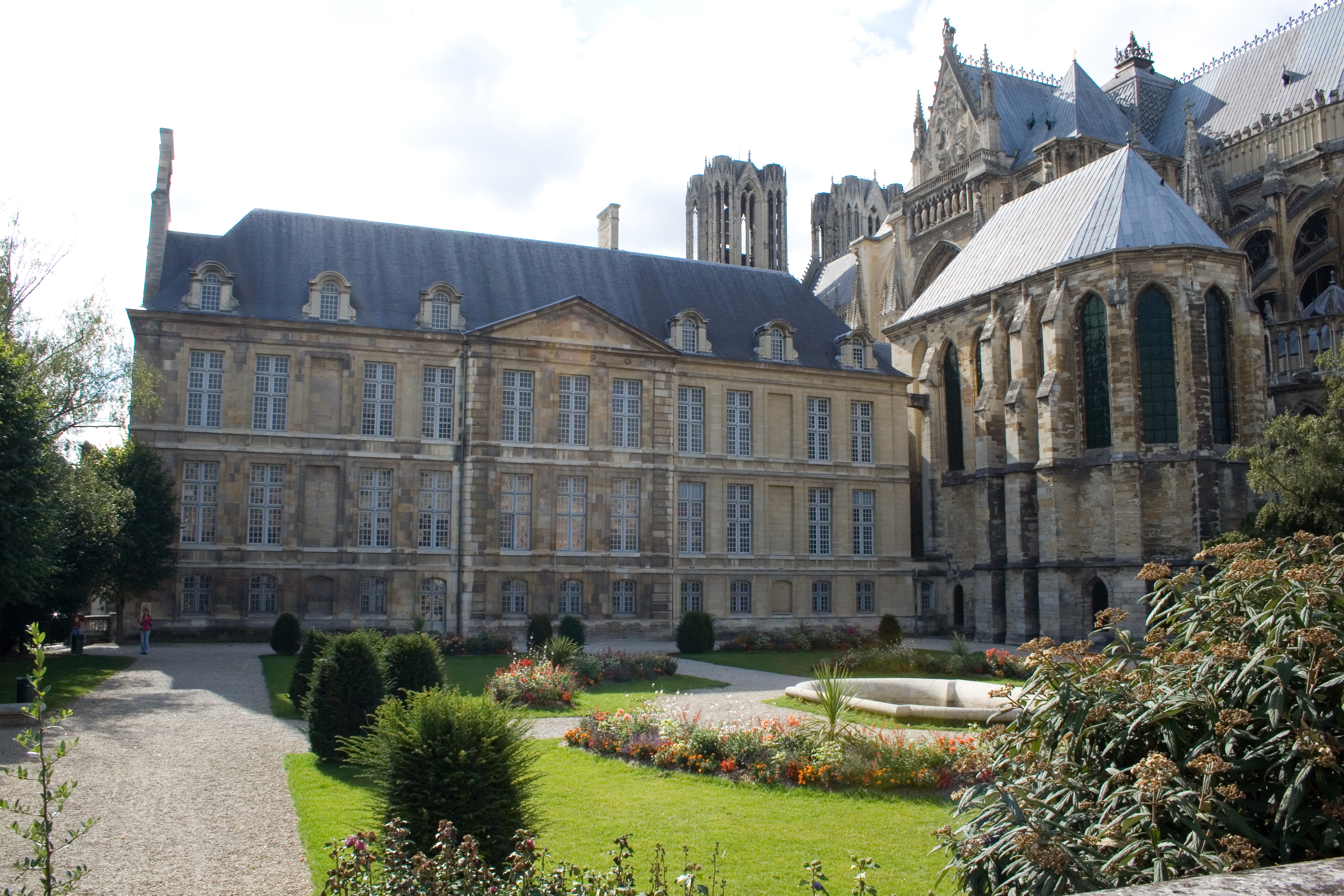 Palais du Tau, Reims, avec la Cathédrale sur le coté, vue depuis l'arrière du bâtiment